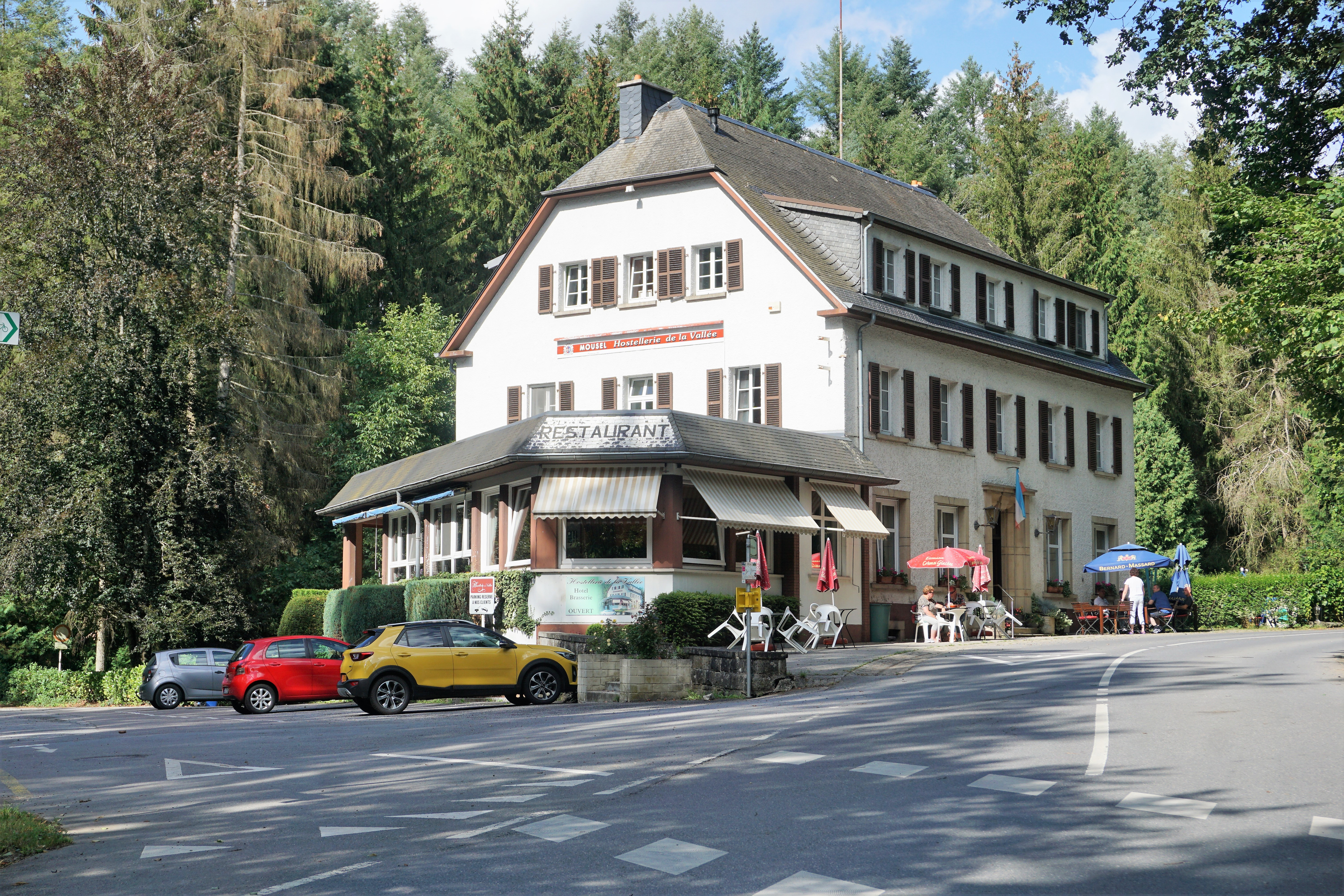 Heffingen, lieu-dit Supp. Hostellerie de la Vallée.